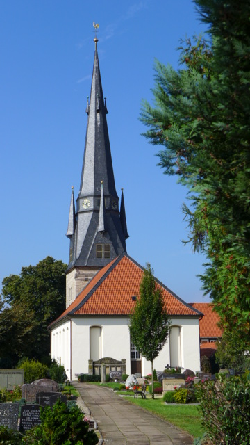 Kirchenschiff = 1738 - Kirchenturm = 1889